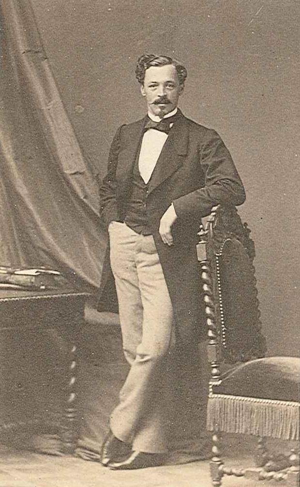 Pierre d'Orléans, prince d'Orléans et duc de Penthièvre (1845-1919)